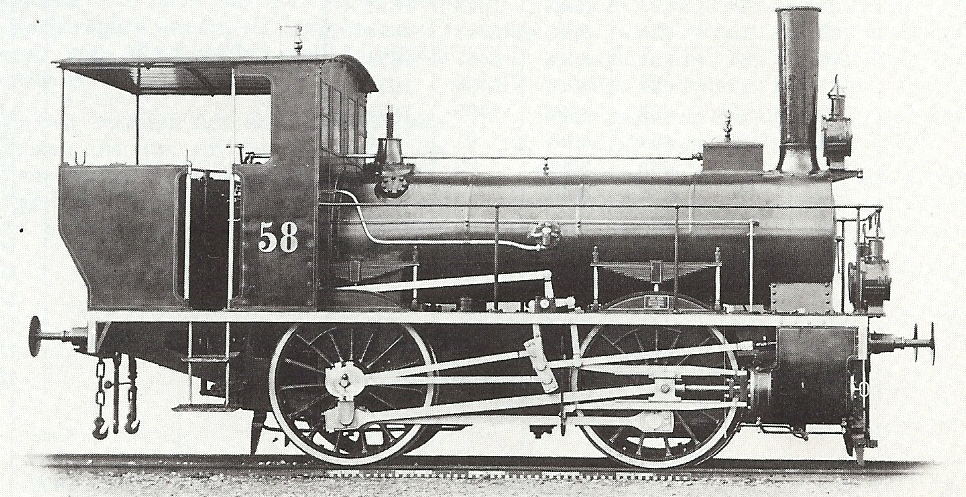 Dampflokomotive E 2/2 Nummer 58 der schweizerischen Nordostbahn